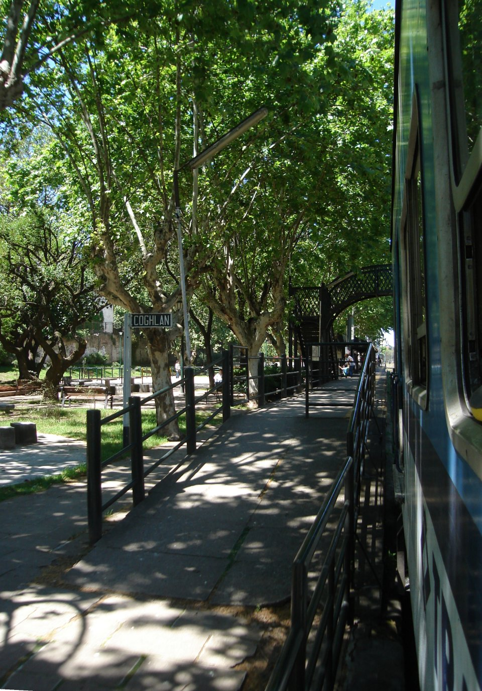 Vista de un acceso al andén, vía descendente (hacia estación Retiro), de la estación Coghlan del Ferrocarril General Mitre, operado en la actualidad por la concesionaria TBA.